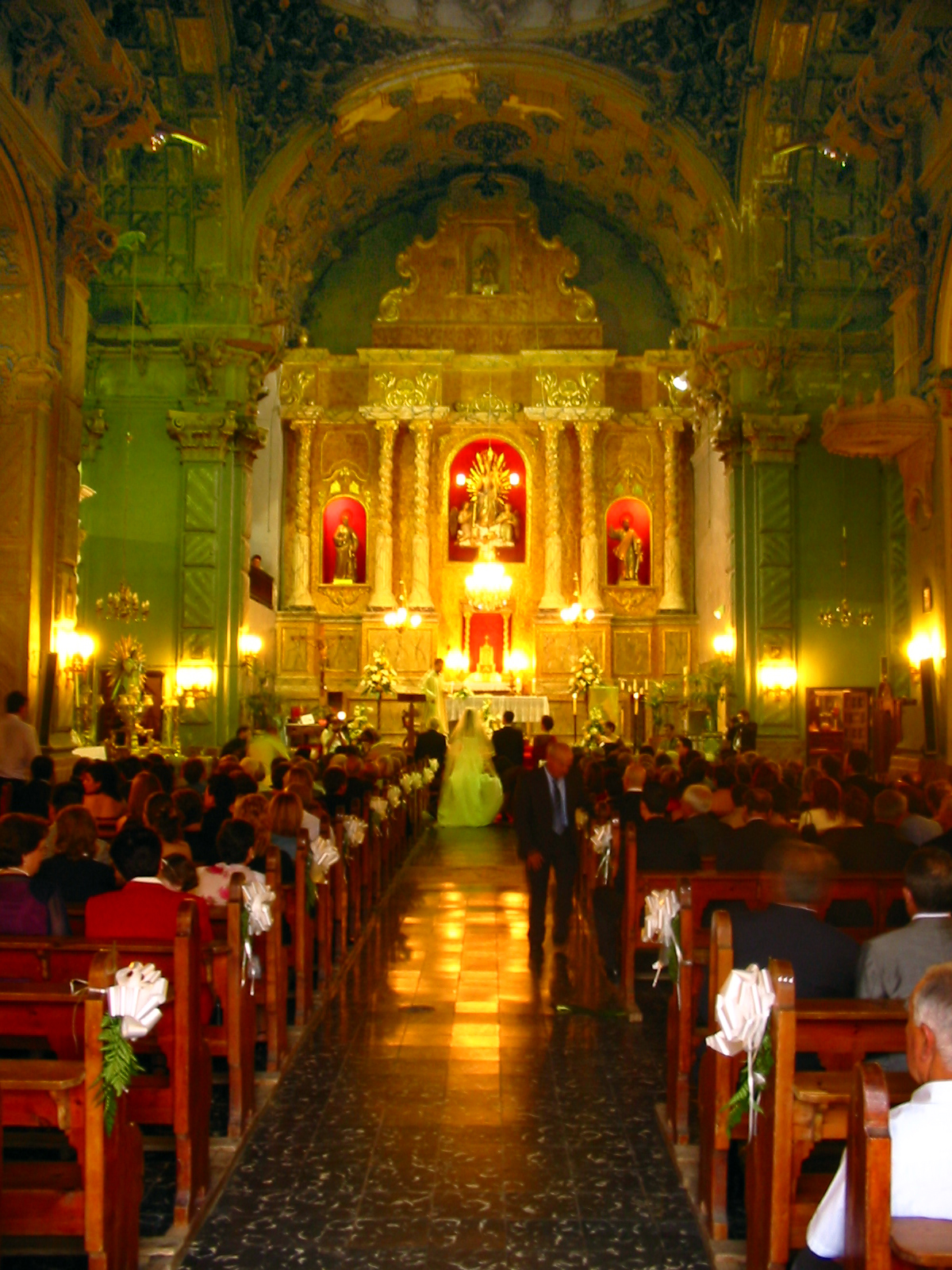 Iglesia de Nuestra Señora de Los Ángeles, Tuéjar (Valencia, España)